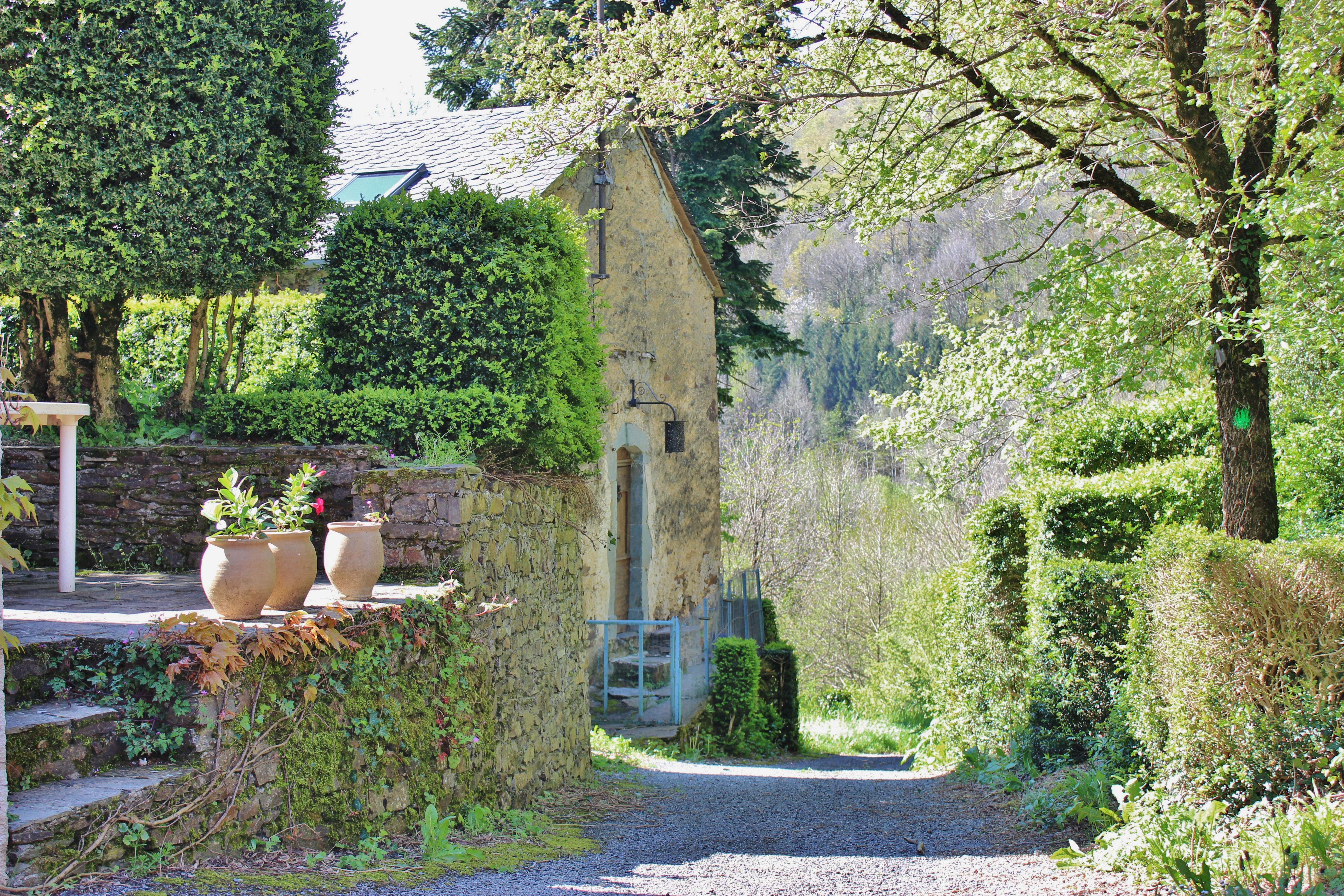 Chemin ensoleillé à Gijounet